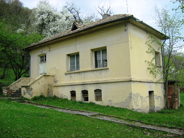 Сградата на старото училище на село Долна Кабда. (новото е съборено) Фото: Вл. Стойков - април 2008 год.